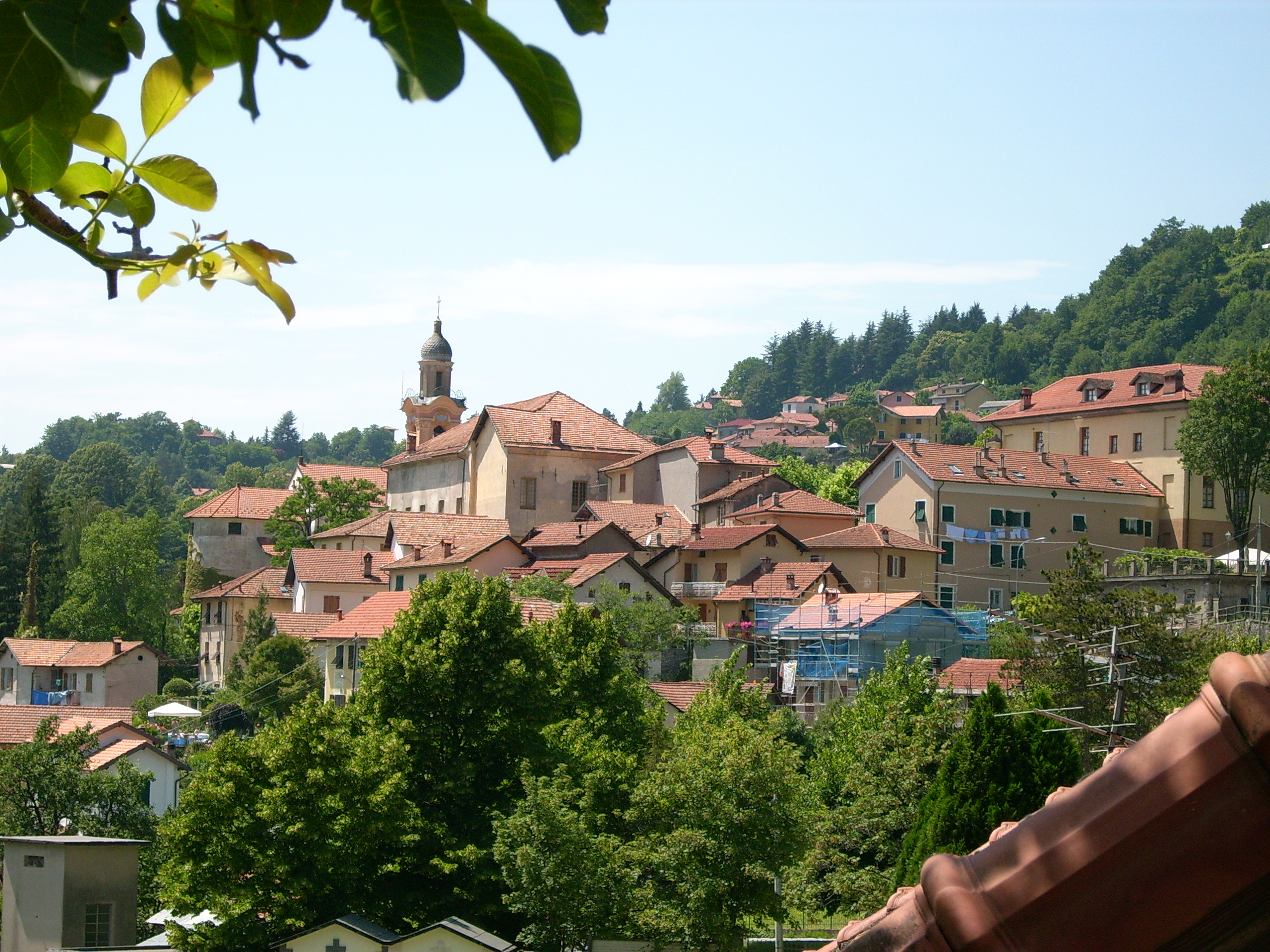 Savignone, Liguria, Italia